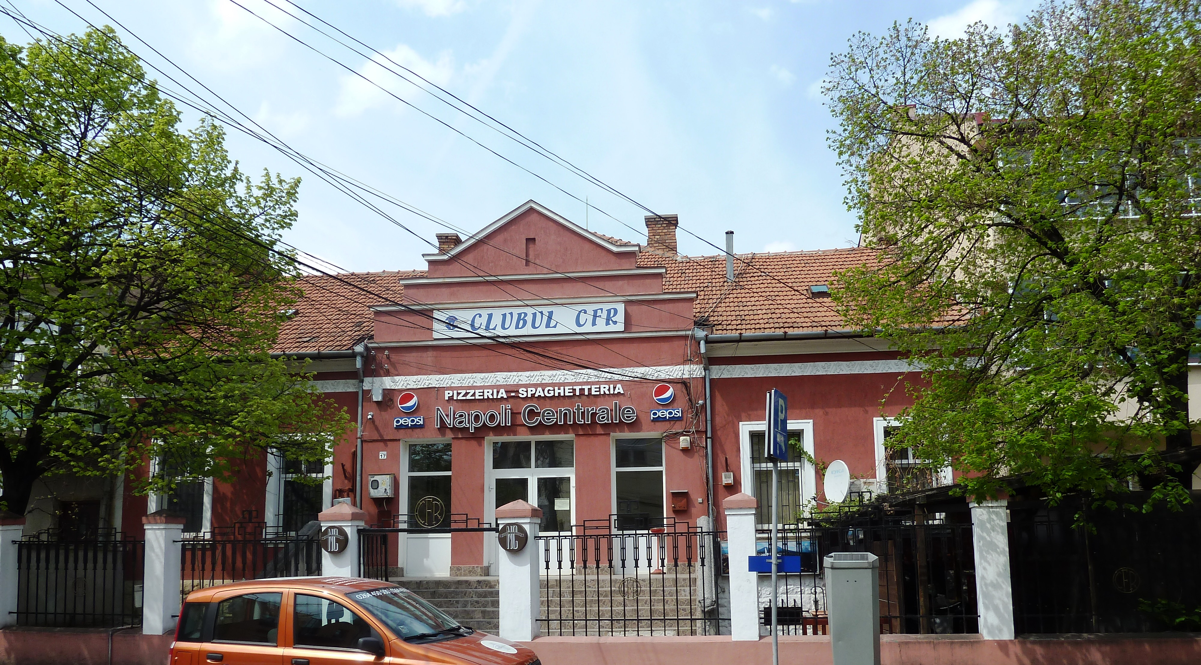 Vasas Klub, Kolozsvár